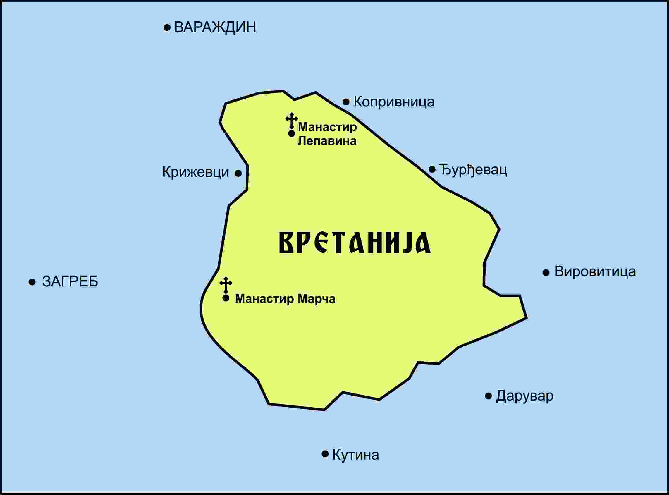 Mapa oblasti u sastavu Varaždinskog generalata koju su Srbi krajišnici, pravoslavni hrišćani, Zagrebačka nadbiskupija, ruski i moldavski vladari, nazivali u 17. i 18. veku "Vretanija".